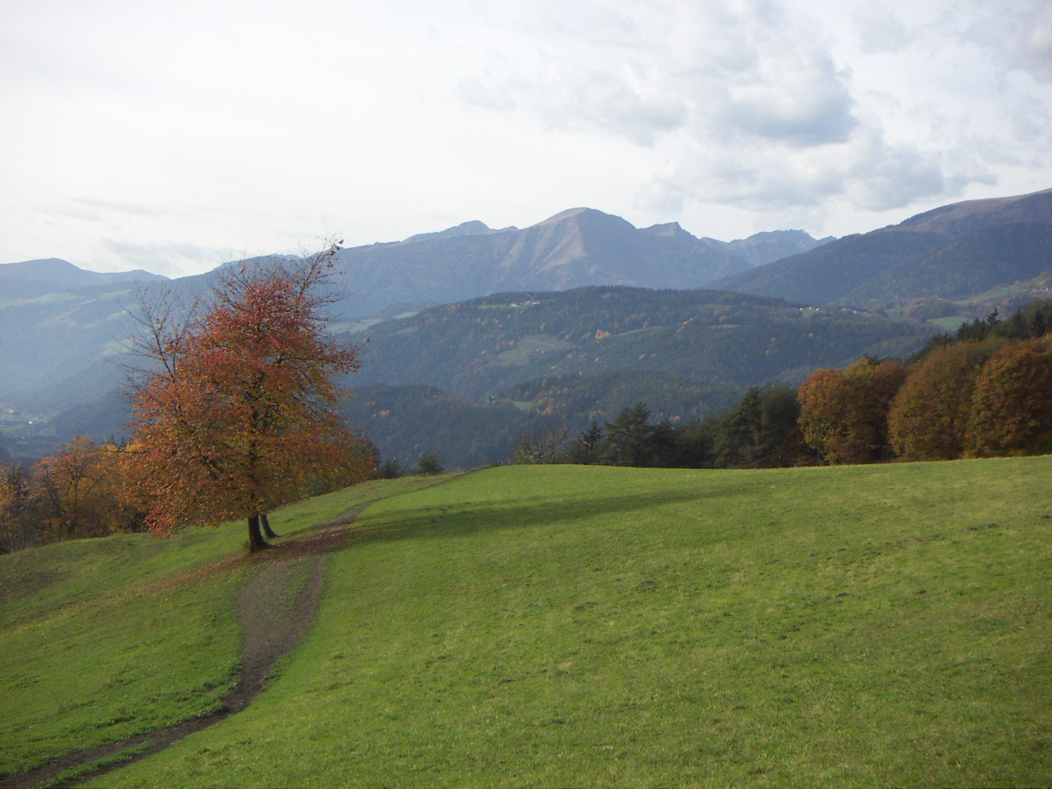 Prati in Pusteria, sopra a Chienes, Alto Adige, Italia.